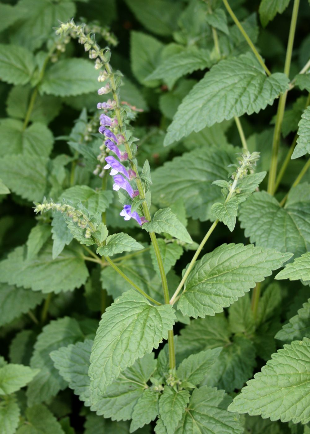 Hohes Helmkraut (Scutellaria altissima), Lippenblütler (Lamiaceae) - Österreich/Austria/Autriche: Wien, Schönbrunn